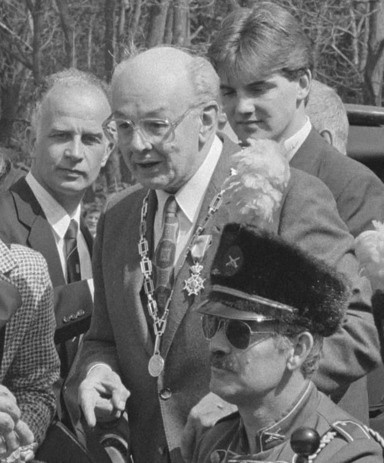 Collectie / Archief : Fotocollectie Anefo Reportage / Serie : [ onbekend ] Beschrijving : Koningin Beatrix in Meyel Datum : 30 april 1986 Trefwoorden : bezoeken, koninginnen Persoonsnaam : Beatrix, koningin, Claus, prins Fotograaf : Croes, Rob C. / Anefo Auteursrechthebbende : Nationaal Archief Materiaalsoort : Negatief (zwart/wit) Nummer archiefinventaris : bekijk toegang 2.24.01.05 Bestanddeelnummer : 933-6440